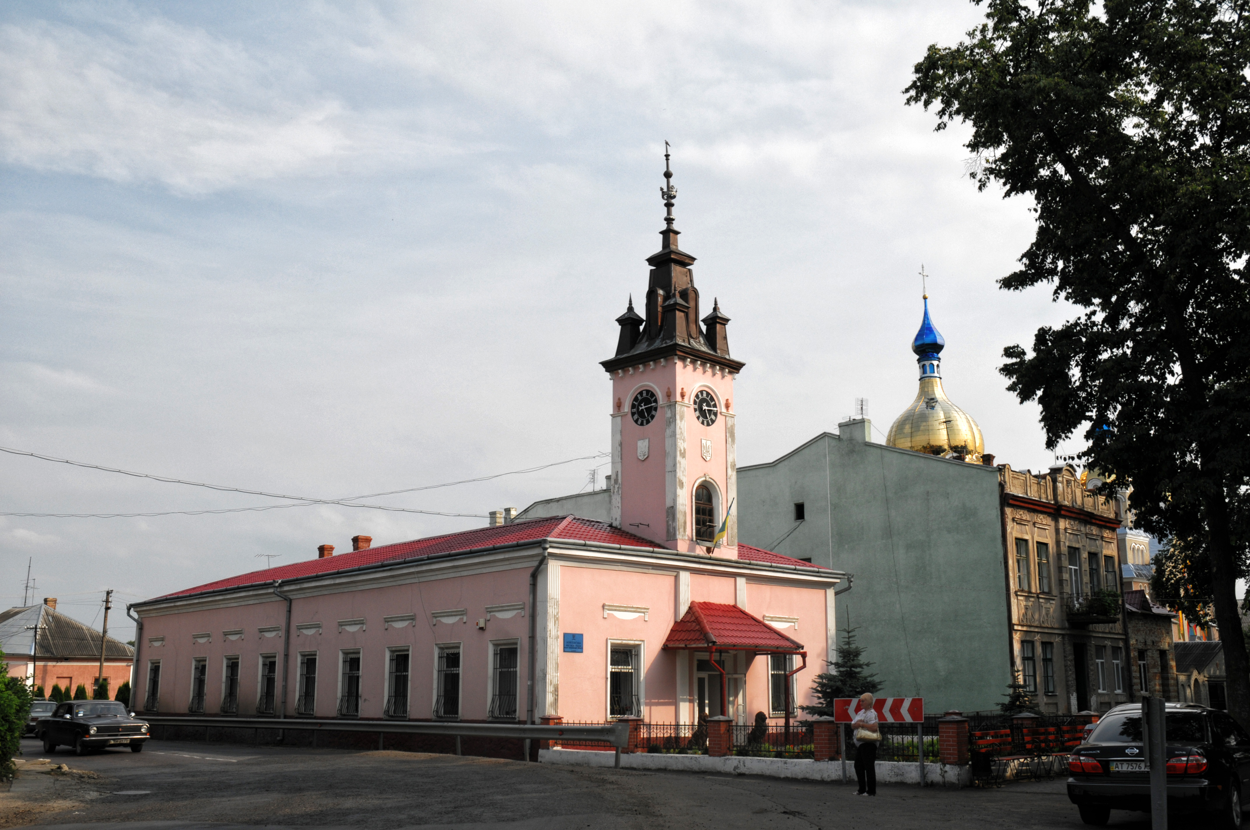 Болехів ратуша